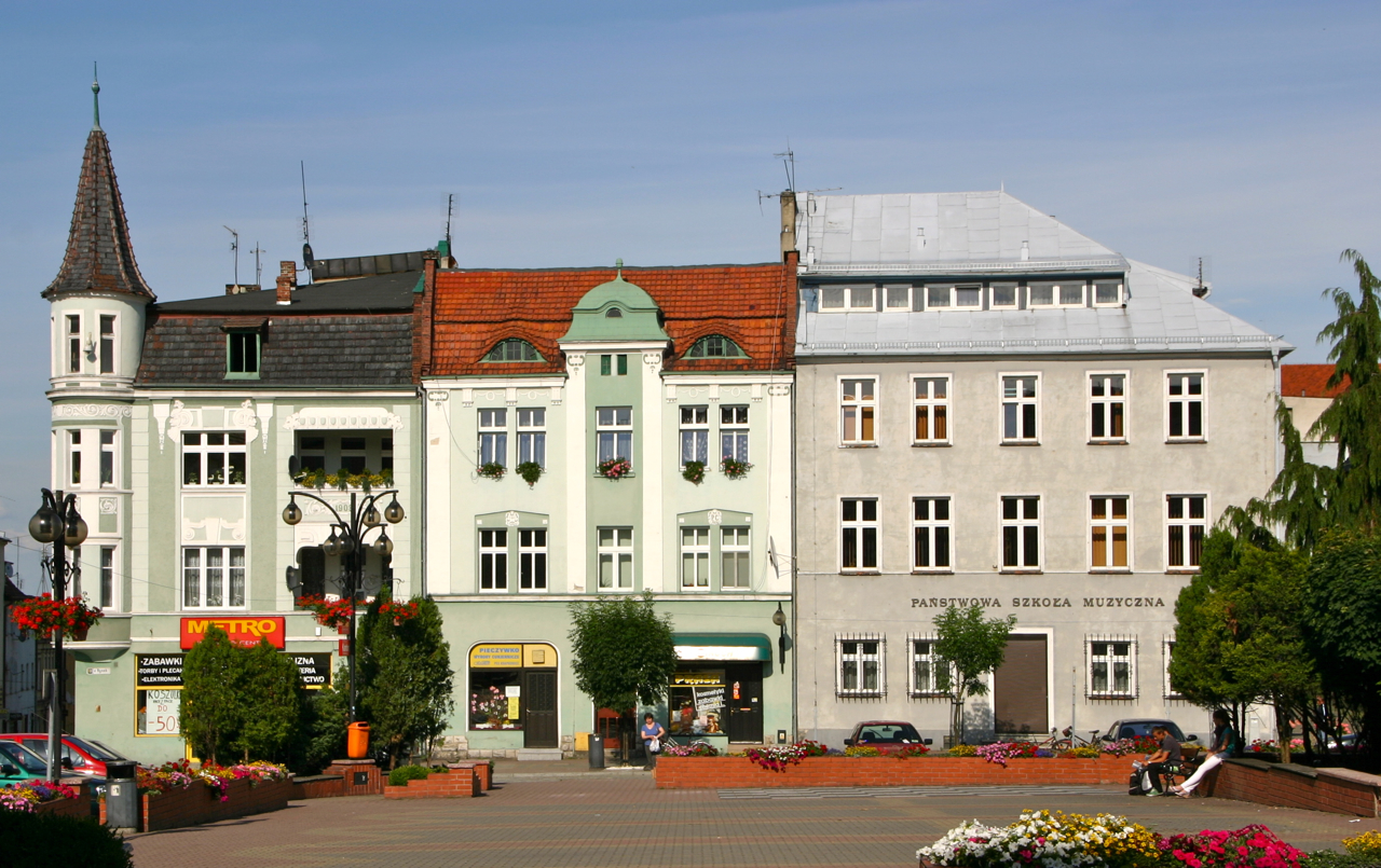 Krapkowice (niem. Krappitz, cz. Krapkovice, Chrapkovice) — miasto powiatowe na Górnym Śląsku, w woj. opolskim, w powiecie krapkowickim, siedziba gminy miejsko-wiejskiej Krapkowice.